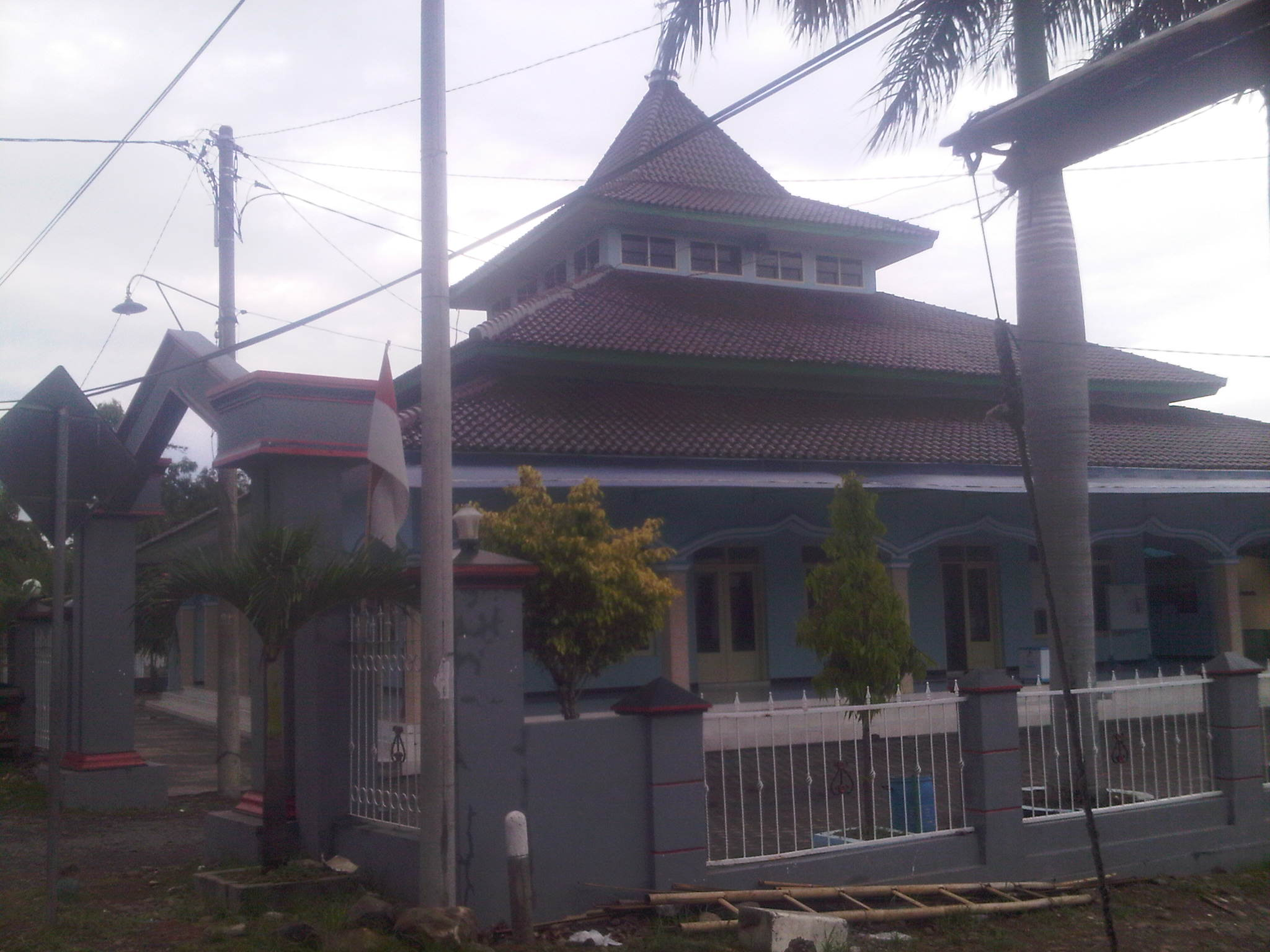 Masjid Al-Mutawwabin